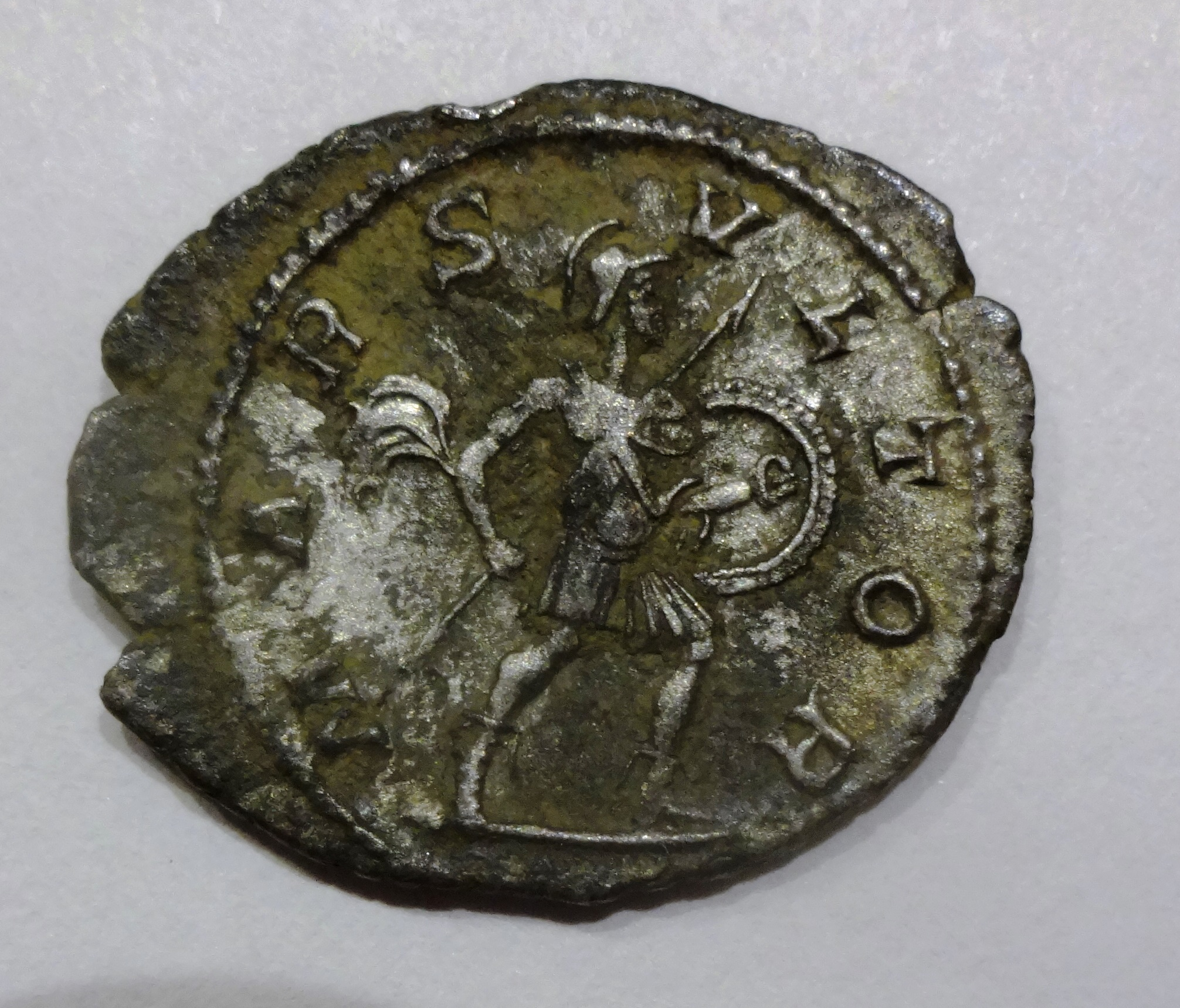 Mars Ultor auf Denar des Alexander Severus', Rückseite